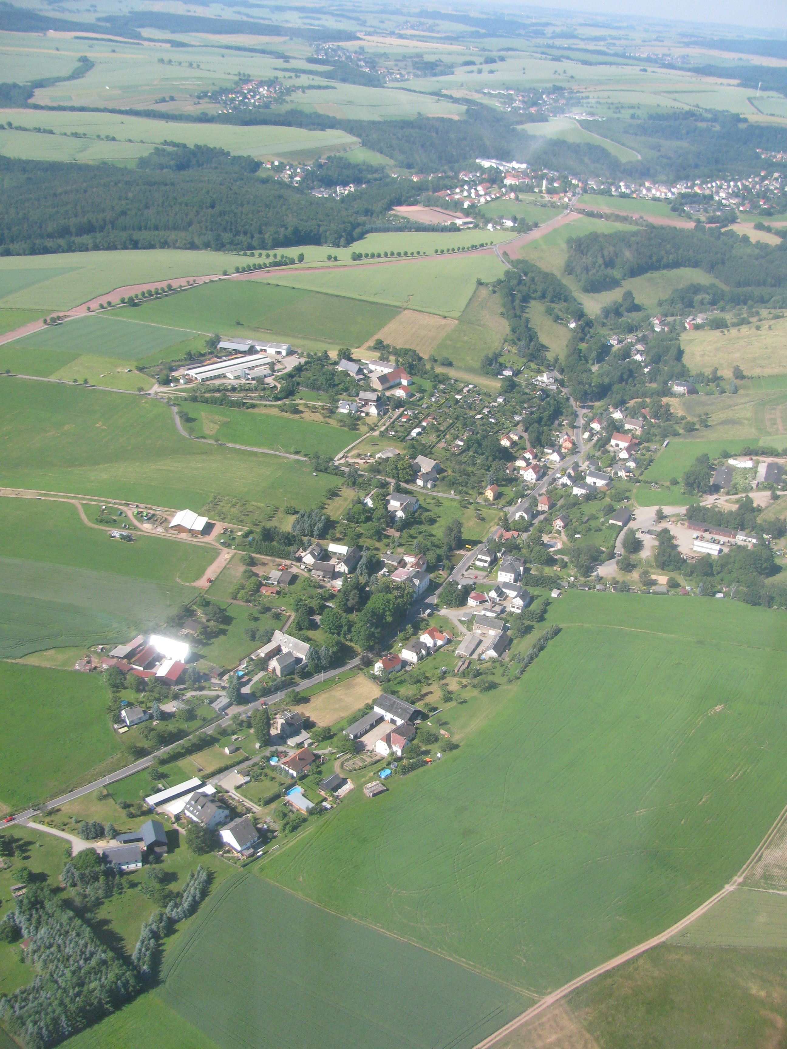 Luftbild Rabenau-Obernaundorf